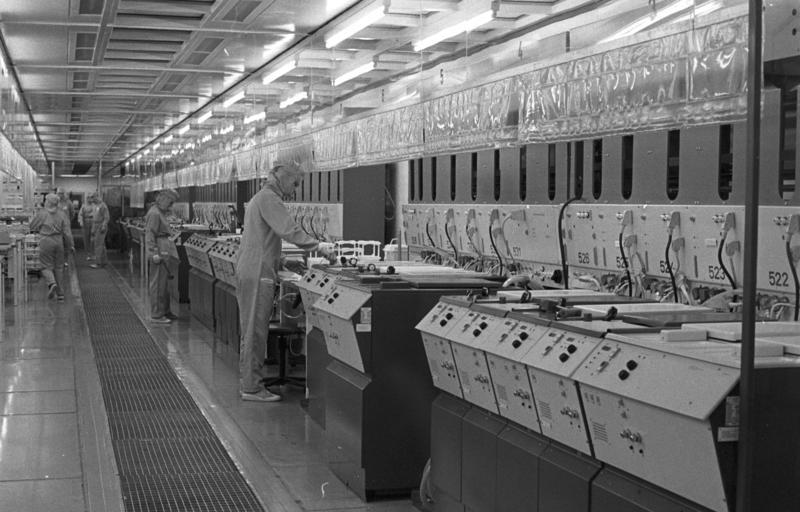 Erfurt, VEB Mikroelektronik ADNZB/Hirndorf 23.5.89 Erfurt: DDR-Zeugnisse Als der U 808 - aus heutiger Sicht mit nur rund 3.000 Transistorfunktionen ausgestattet - 1974/75 in Serie ging, bestimmten im Funkwerk noch Röhren und Transistoren die Produktion. Inzwischen werden von den Chipkonstrukteuren die ersten strukturierten Siliziumplättchen mit neuentwickelter Schaltung erwartet. Erst nach der Präparation in den Reinsträumen zeigt sich endgültig der Wert ungezählter Berechnungen.